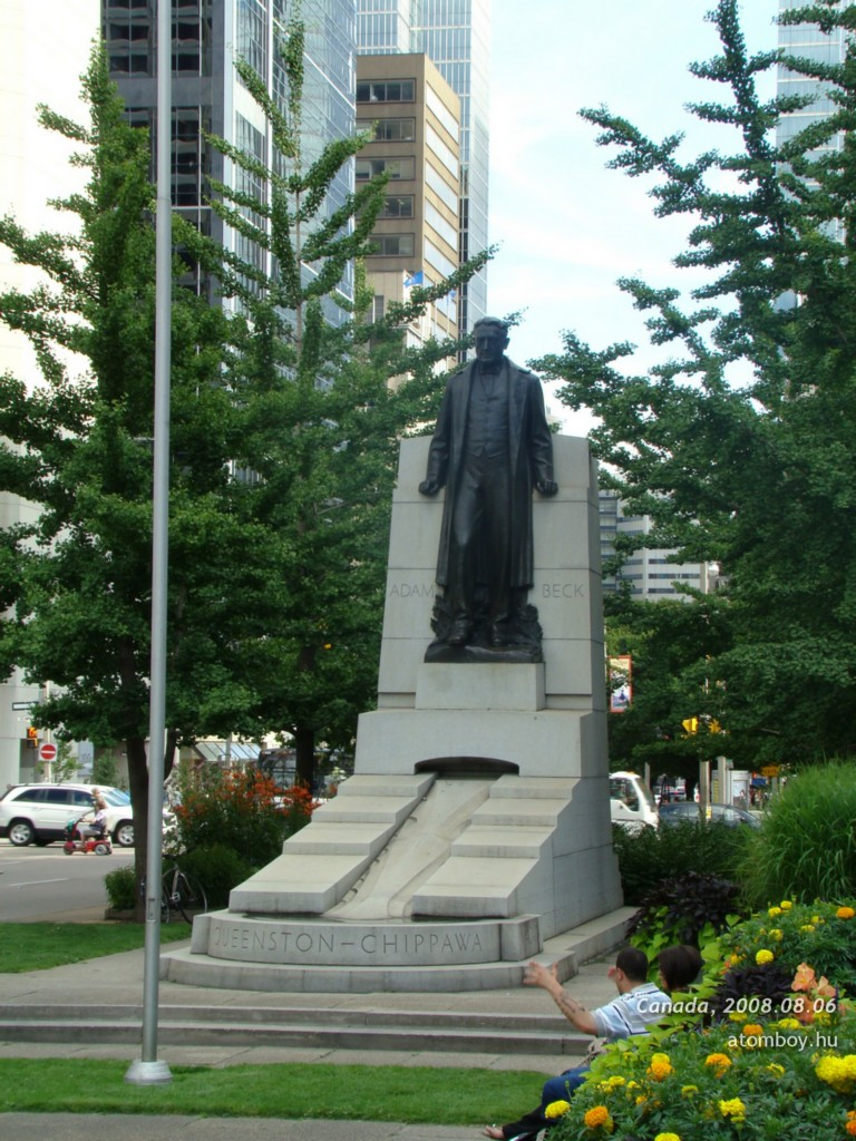 Adam Beck - Chippawa